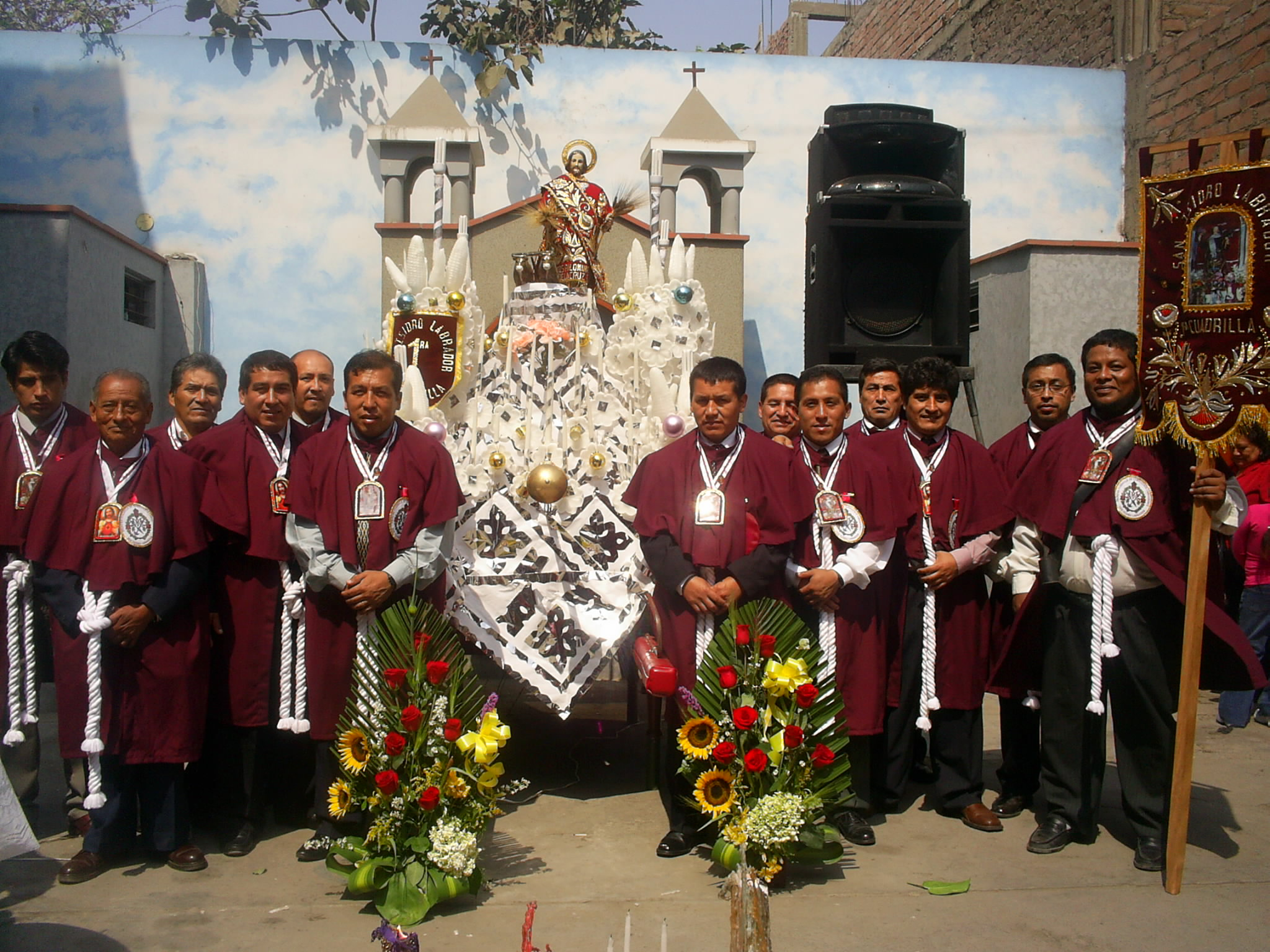 Primera cuadrilla de nuestro Santo Patron San Isidro Labrador , integrada por los hijos del pueblo San Isidro de Carampa. Lima - Peru 2006 Autor: Jose Antonio Martinez Martinez